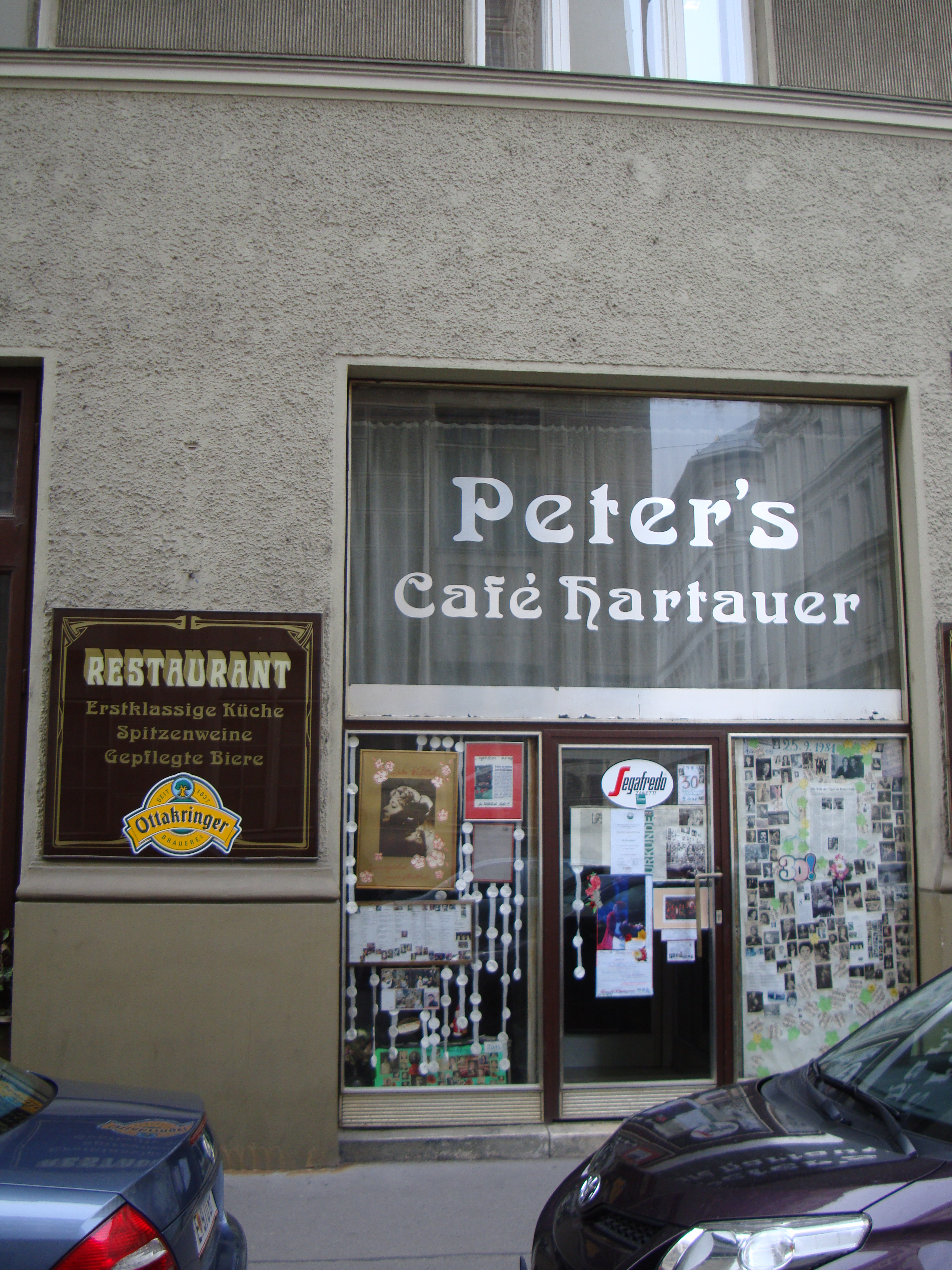 Peter Hartauers Cafe